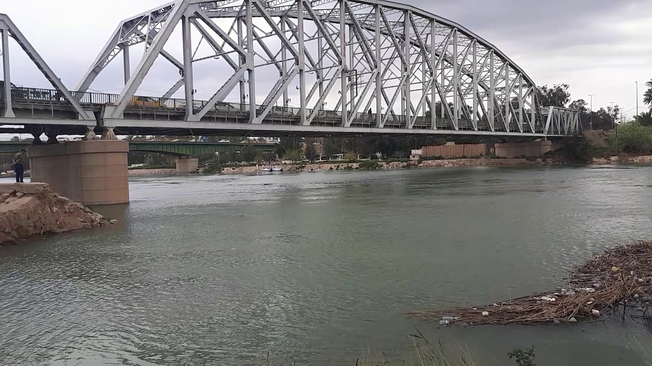 نهر ديالى في مدينة بعقوبة المار الى متنزه بين الجسرين